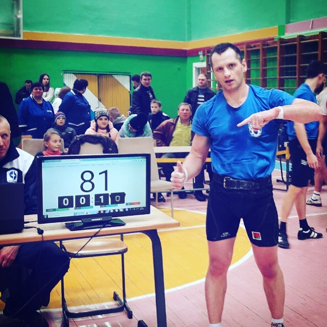 Чемпионат РБ по гиревому спорту 2019 г., г. Житковичи